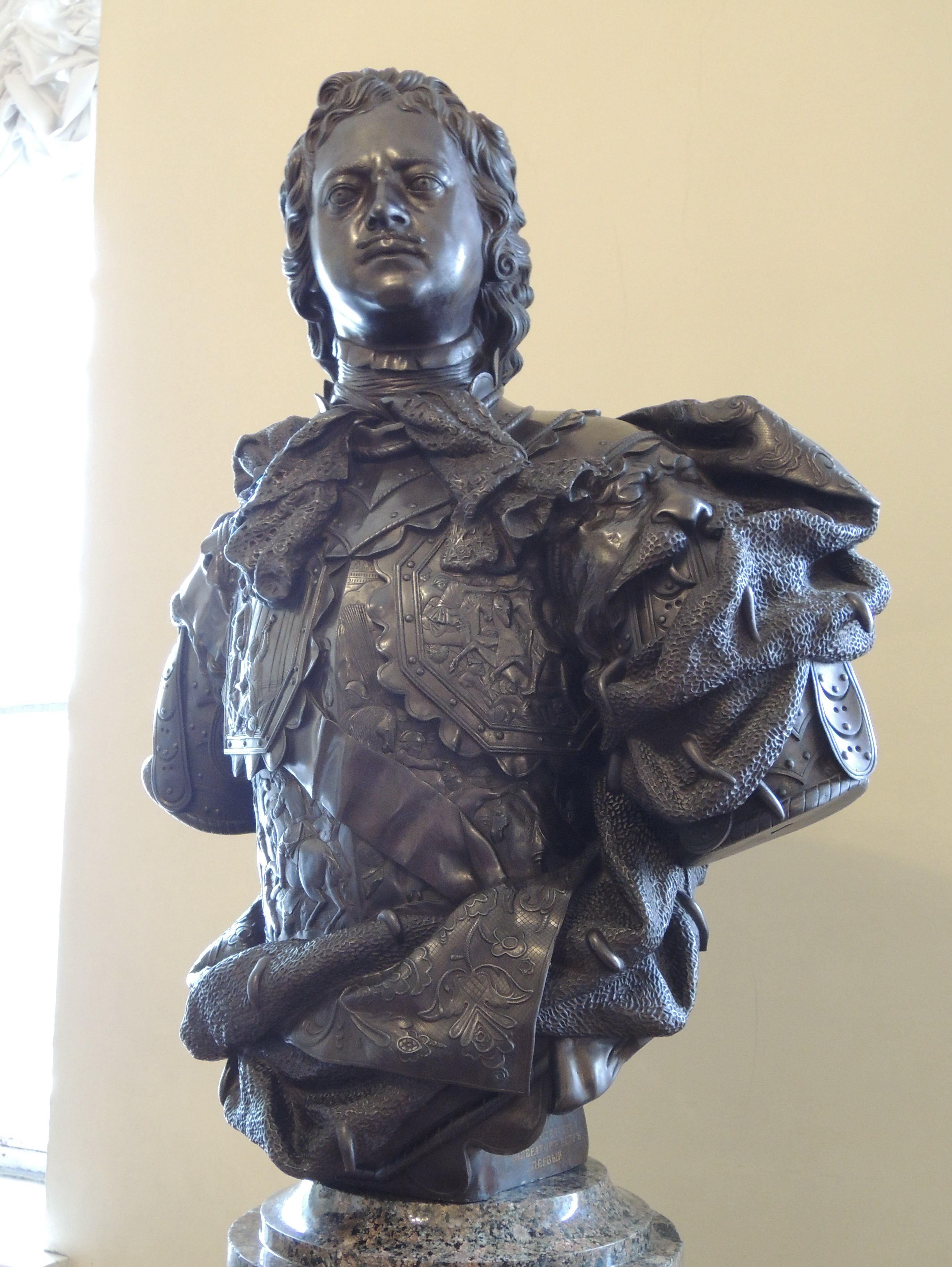 Карло Растрелли. «Портрет Петра I», бронза. 1723-9. ГРМ